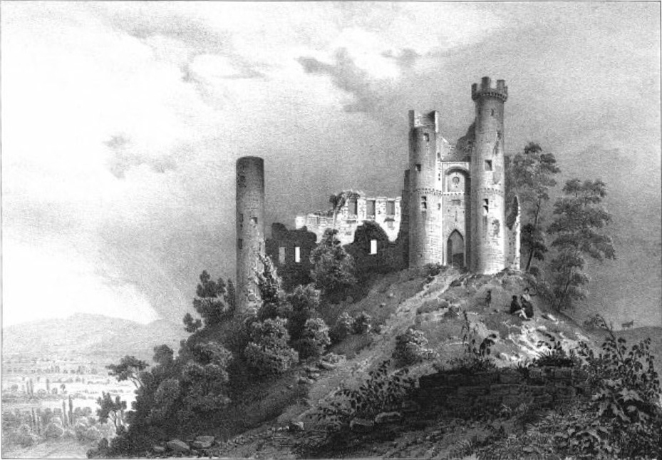 Album du Dauphiné - tome IV, litographie des ruines du Chateau de Bressieux